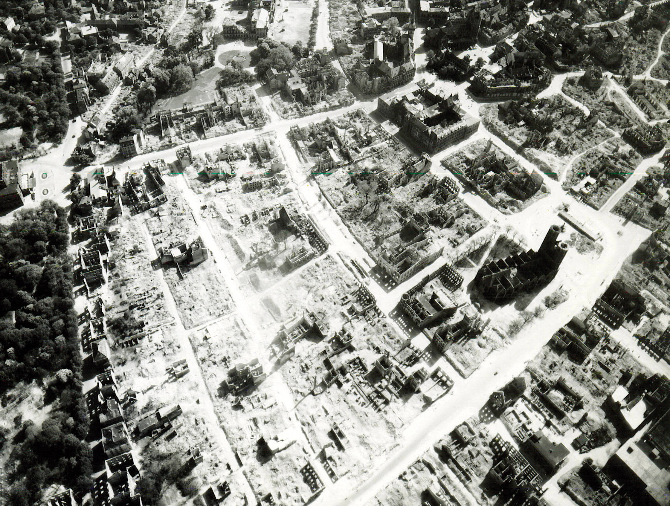 Blick auf den Braunschweiger Hagen nach den Bombardierungen des Zweiten Weltkriegs.